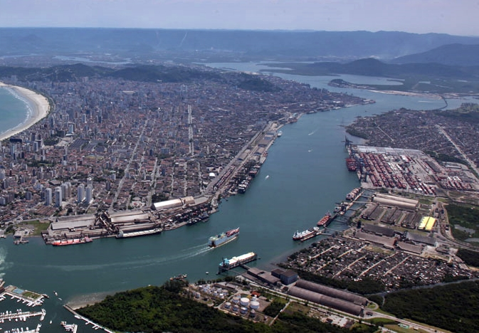 Fotografia aérea de Santos, São Paulo, Brasil.